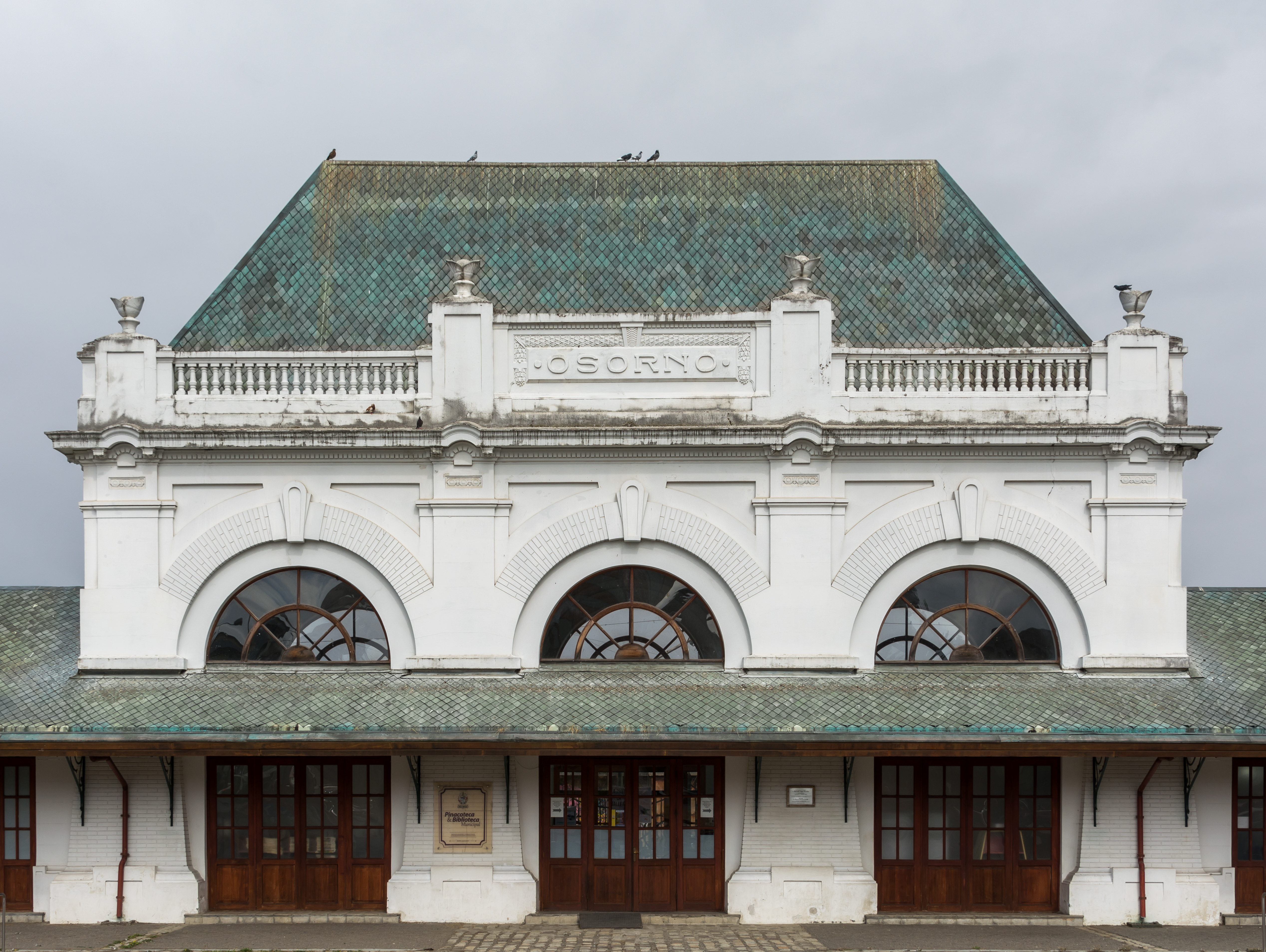 Antigua Estación, Osorno, Región de Los Lagos, Chile.